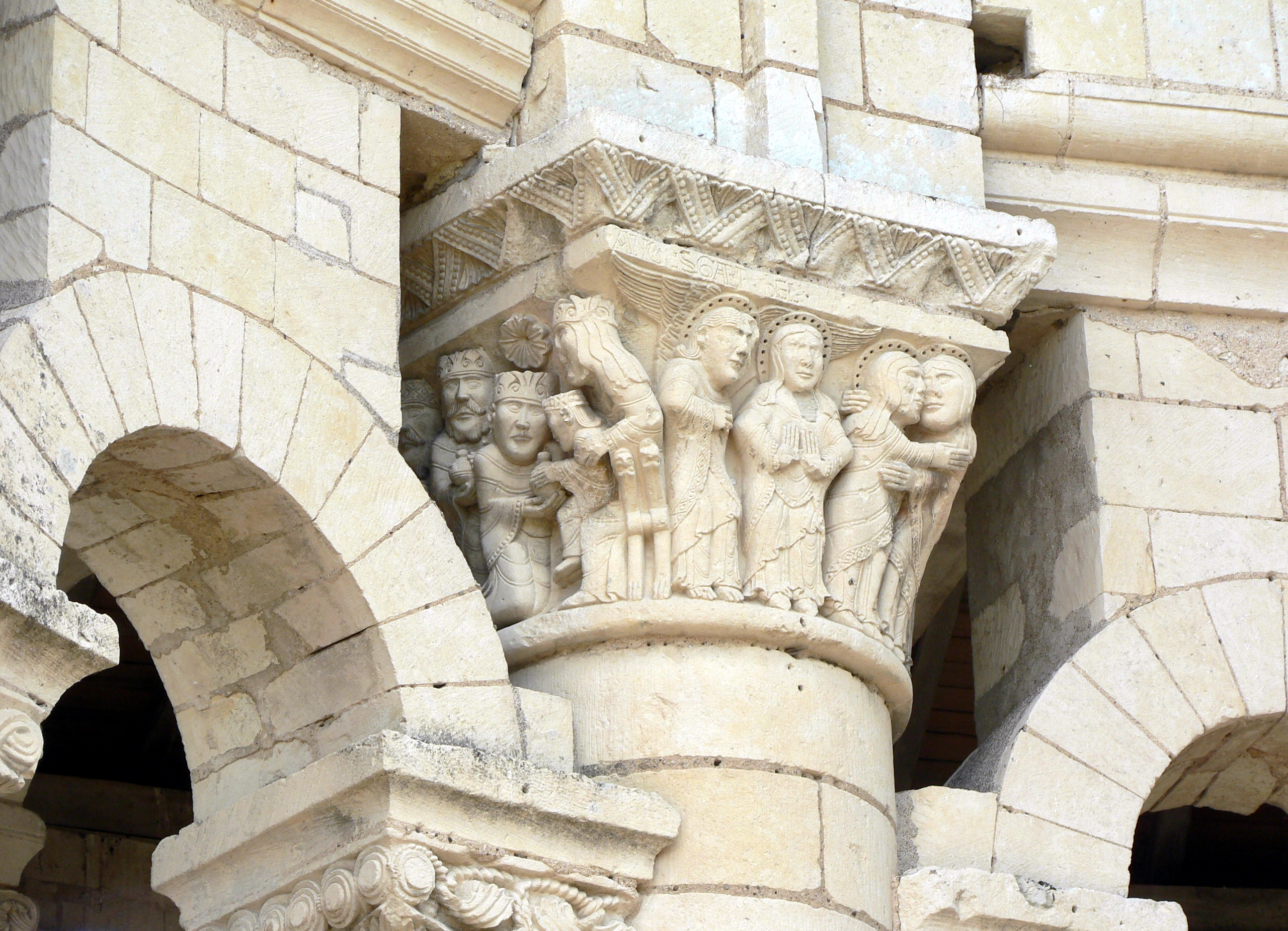 Prieuré Saint-Léonard (XIe siècle) à L'Île-Bouchard, Indre-et-Loire, France